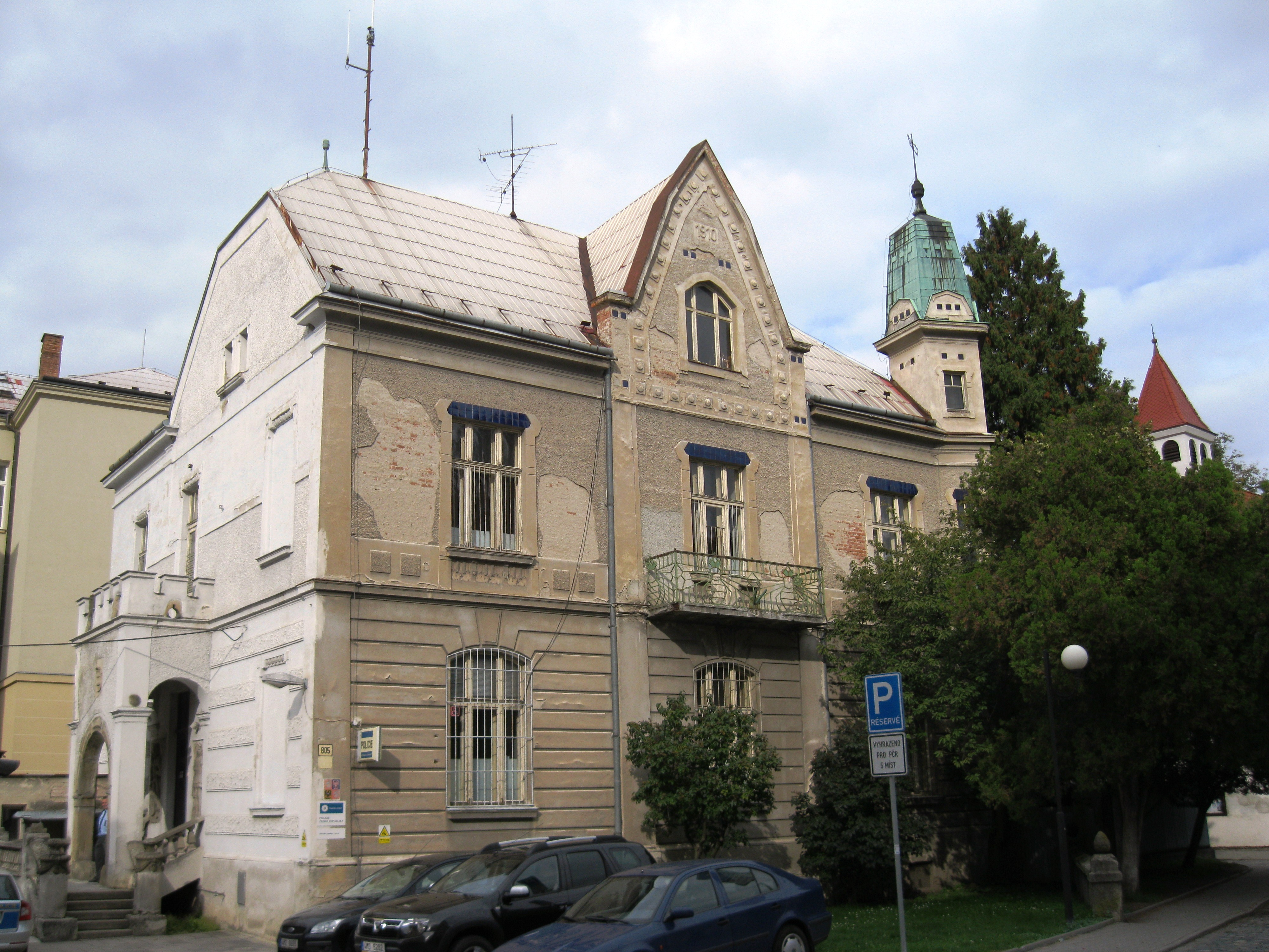 Vila - Sochova vila (Litovel), Husova 805/20, Litovel